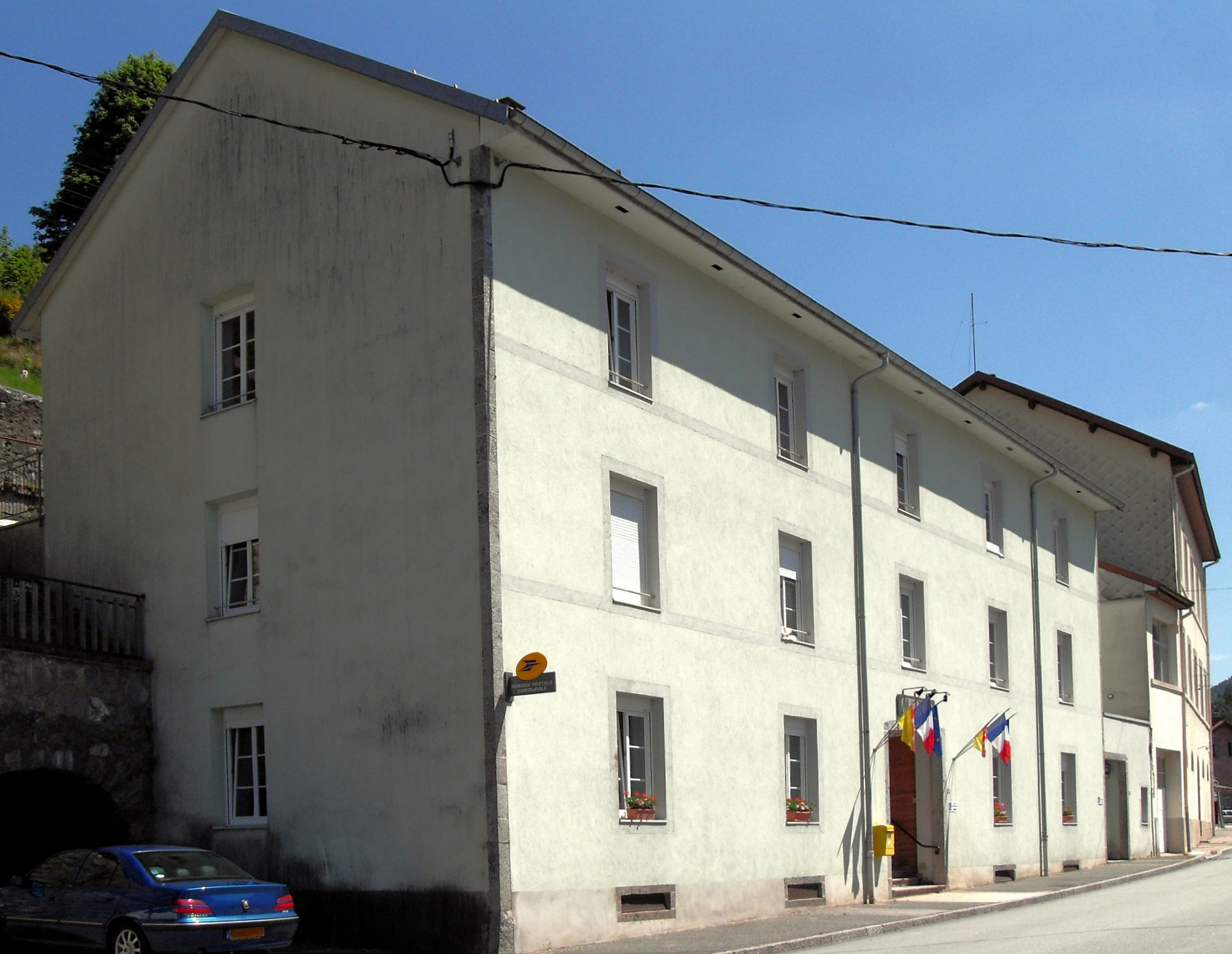 La mairie de Rochesson